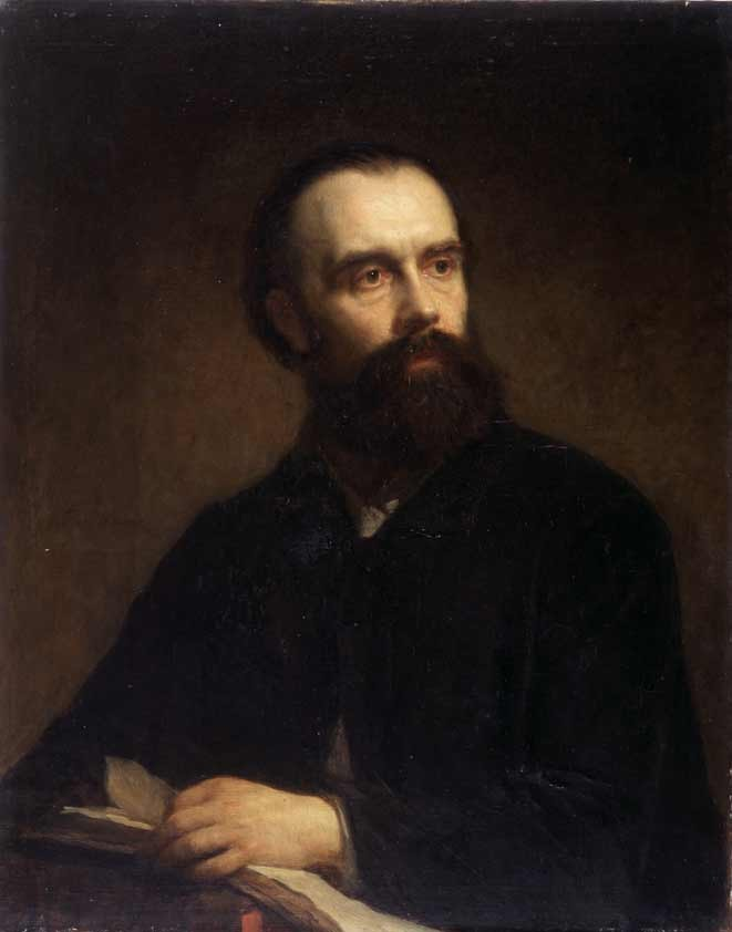 Portrait of Belgian painter Felix De Vigne